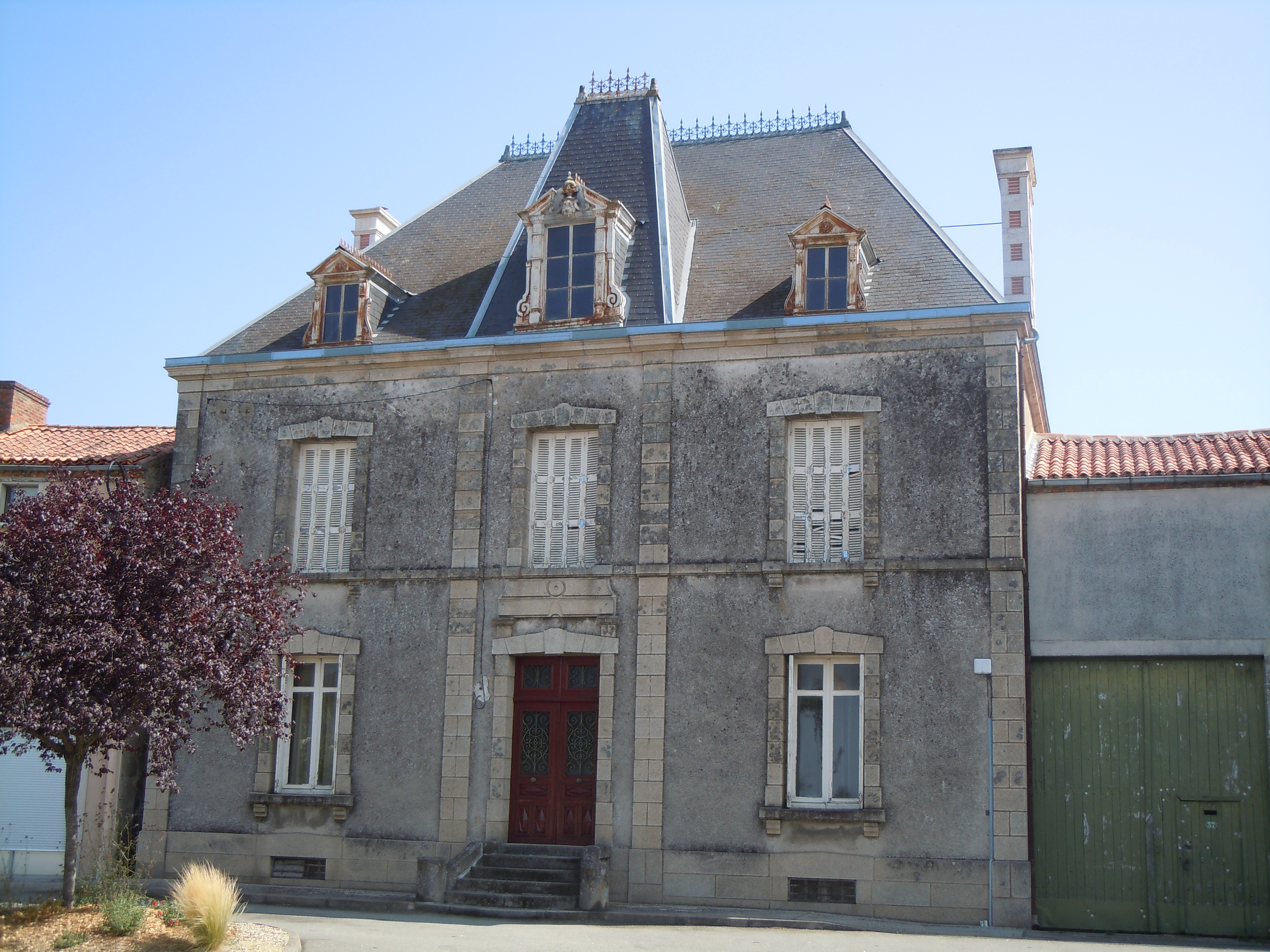 Maison bourgeoise place Saint-Martin à Chiché (Deux-Sèvres)